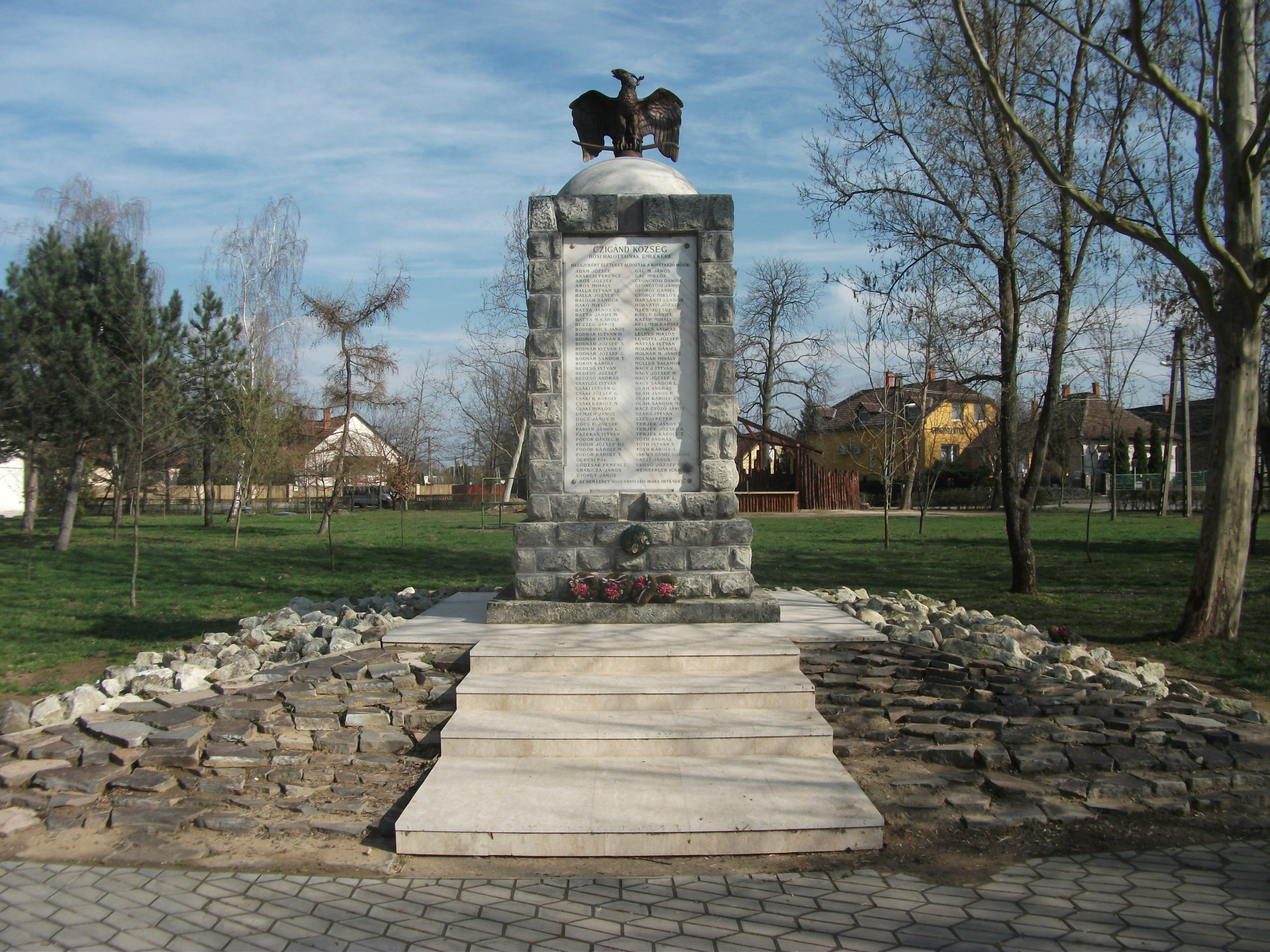 Az 1938-ban felavatott I. világháborús műemlék Cigándon, a Hősök terén.